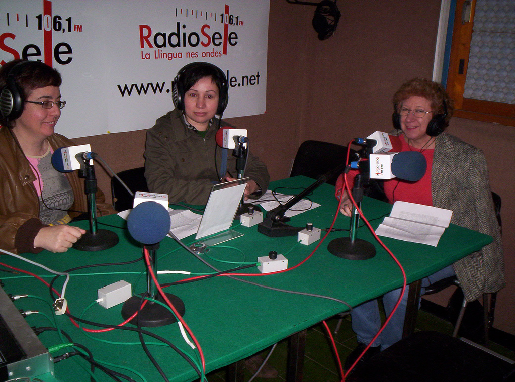 Candidates d'Unidá nuna entrevista en Radio Sele.